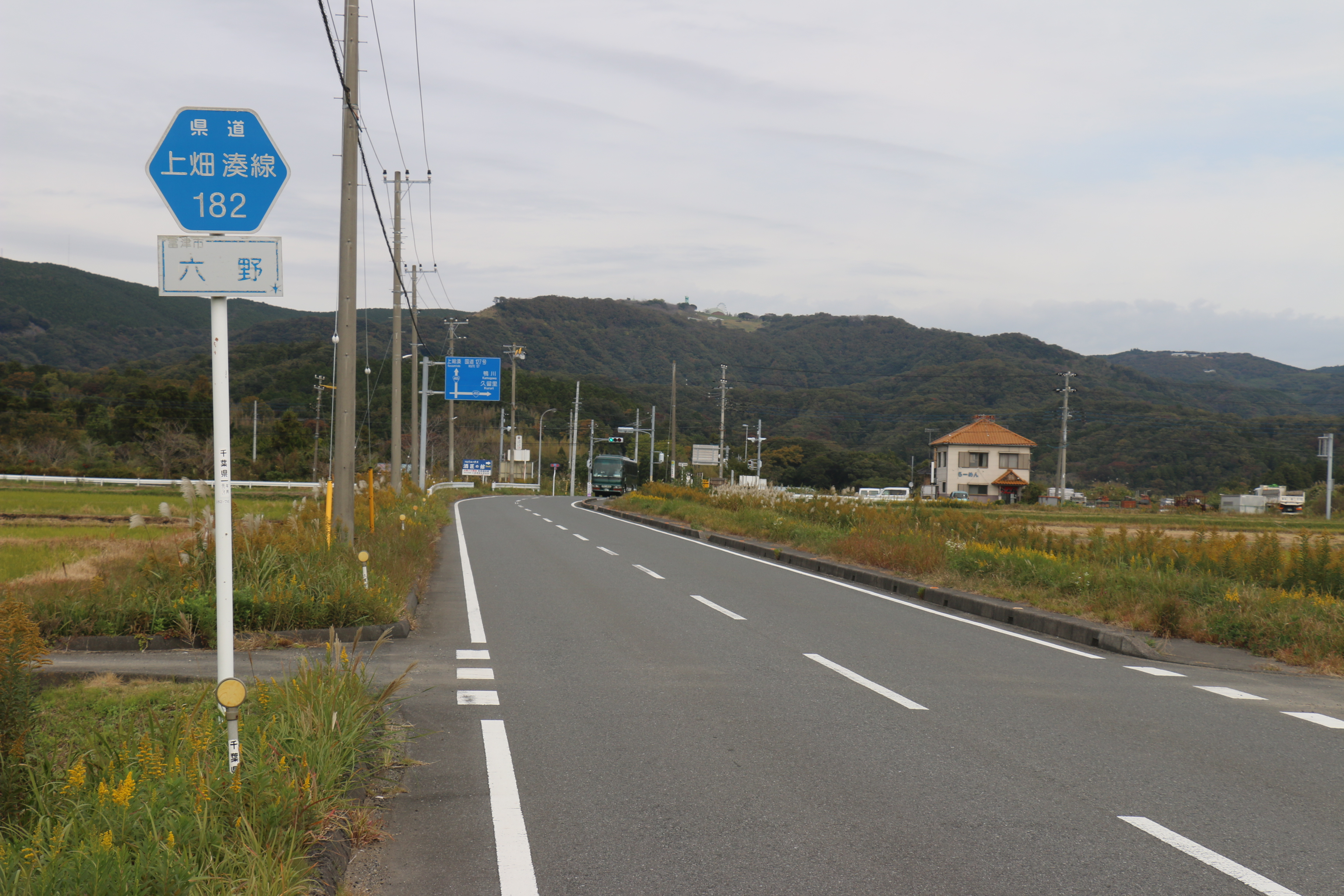 富津市六野付近